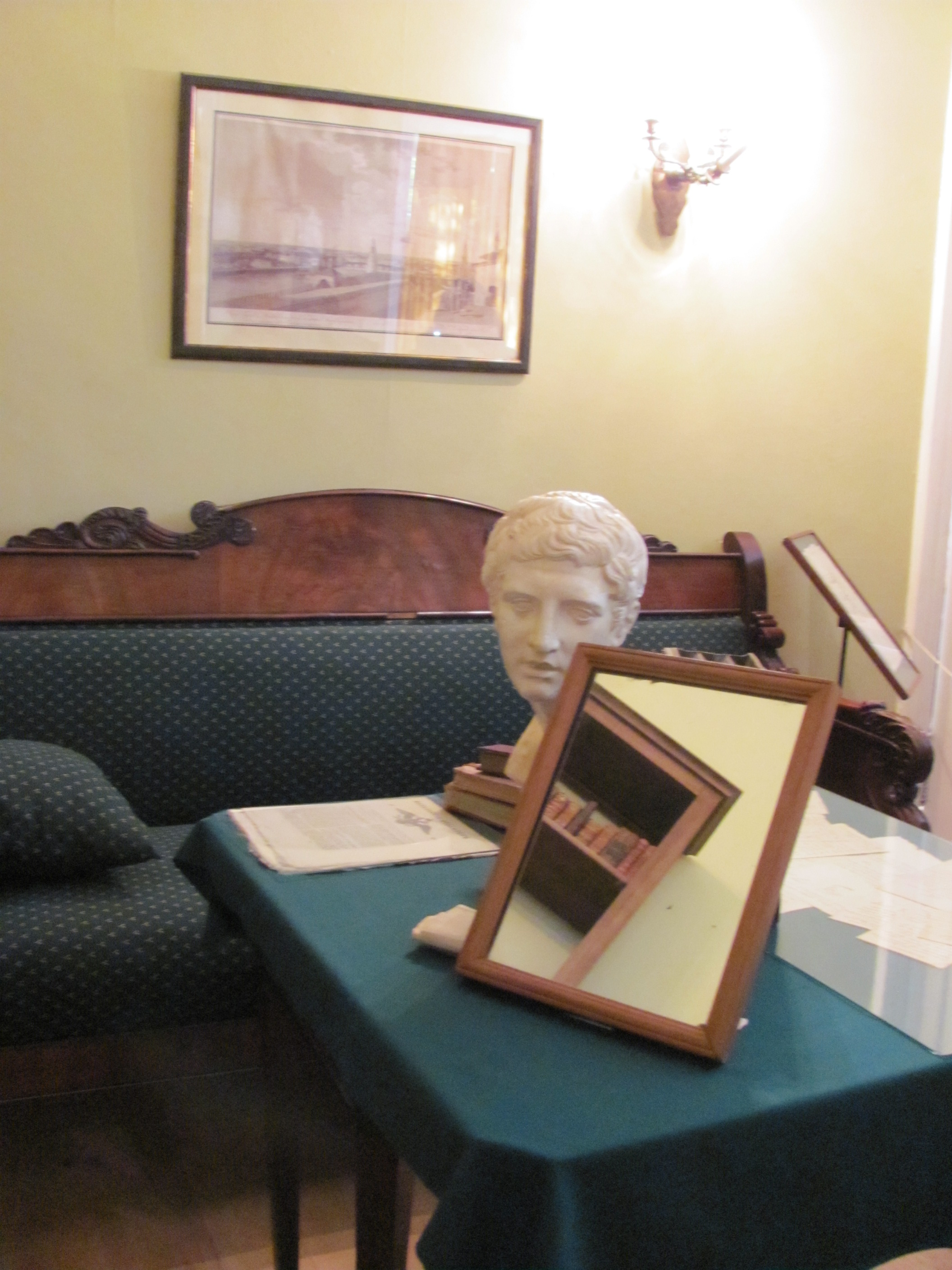 Большое Болдино, музей А. С. Пушкина. Кабинет поэта.